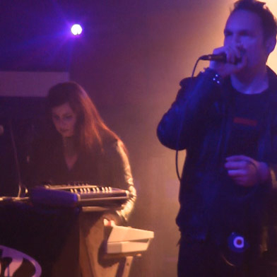 Love? live Bandshot, Red Club Berlin, 2014-05-29